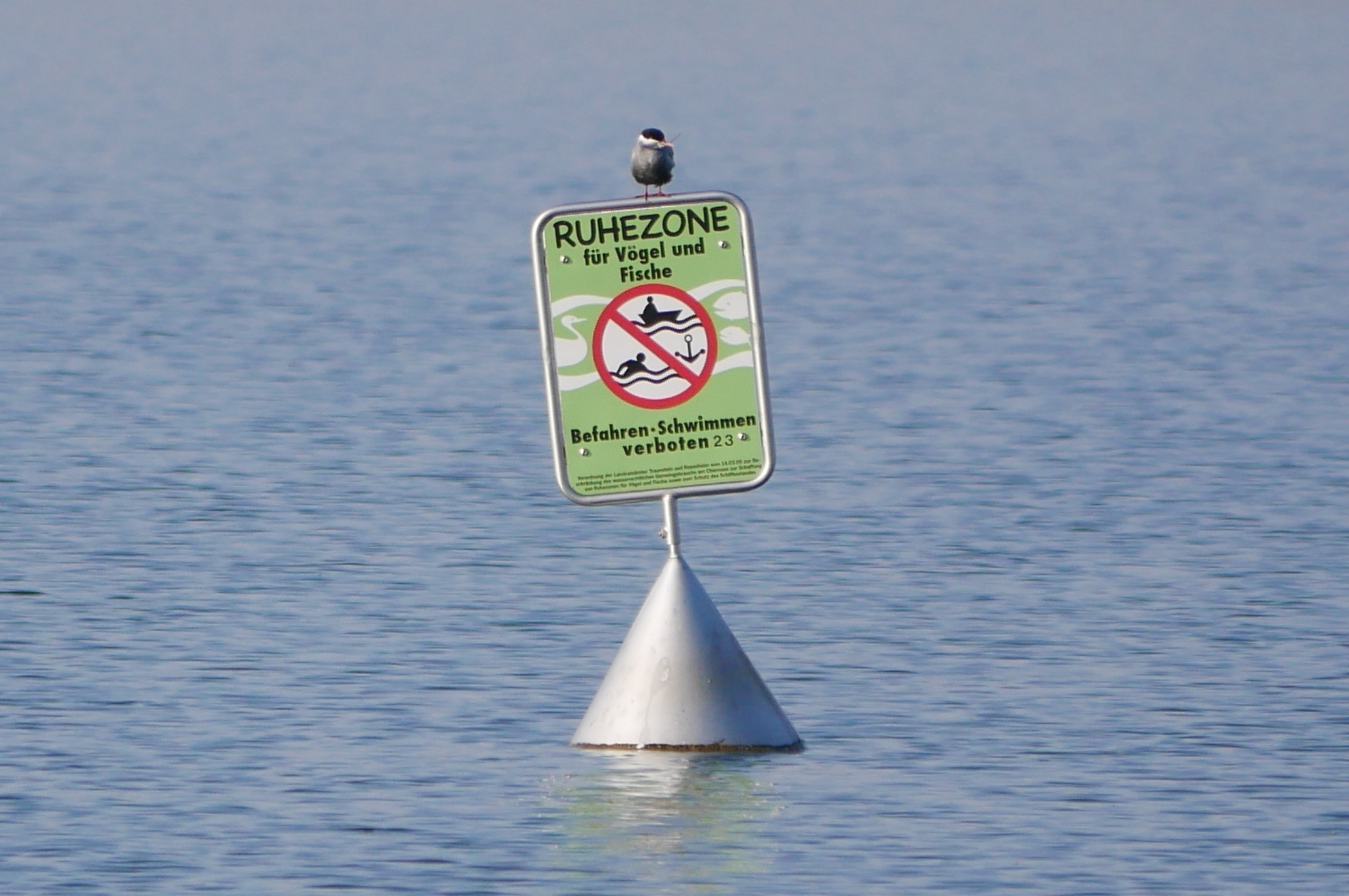 Eine durchziehende Weißbartseeschwalbe posiert auf einer Boje, welche Ruhezonen am Chiemsee markiert. Der seltene Vogel ist somit der beste Botschafter für den Sinn der Ruhezonen.